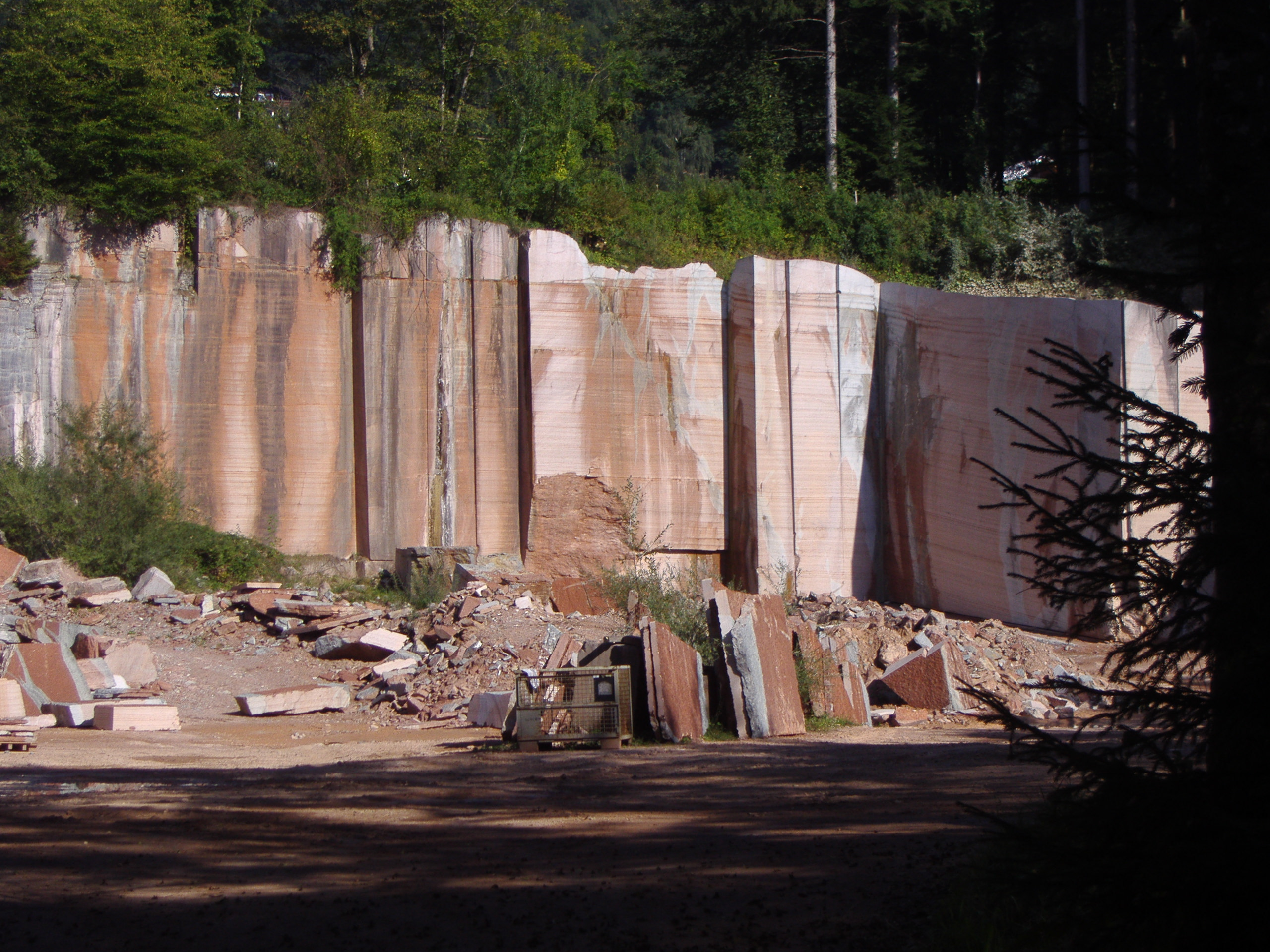 Der Wimberg- oder Plattenbruch in Adnet, Österreich. – Besitzer: Österr. Bundesforste, Pächter: Marmor Kiefer. Der „Marmor“ (geol. eigentlich Kalkstein) aus diesem Steinbruch besteht aus dünngeschichteten und teilweise entfärbten Knollenkalken aus dem Lias (195-175 Mill. Jahre). Die oberste Bank mit etwa 2-4m Mächtigkeit ist sogenannter Adneter Scheck-Marmor mit weißen Kalkspatflecken durchsetzt.